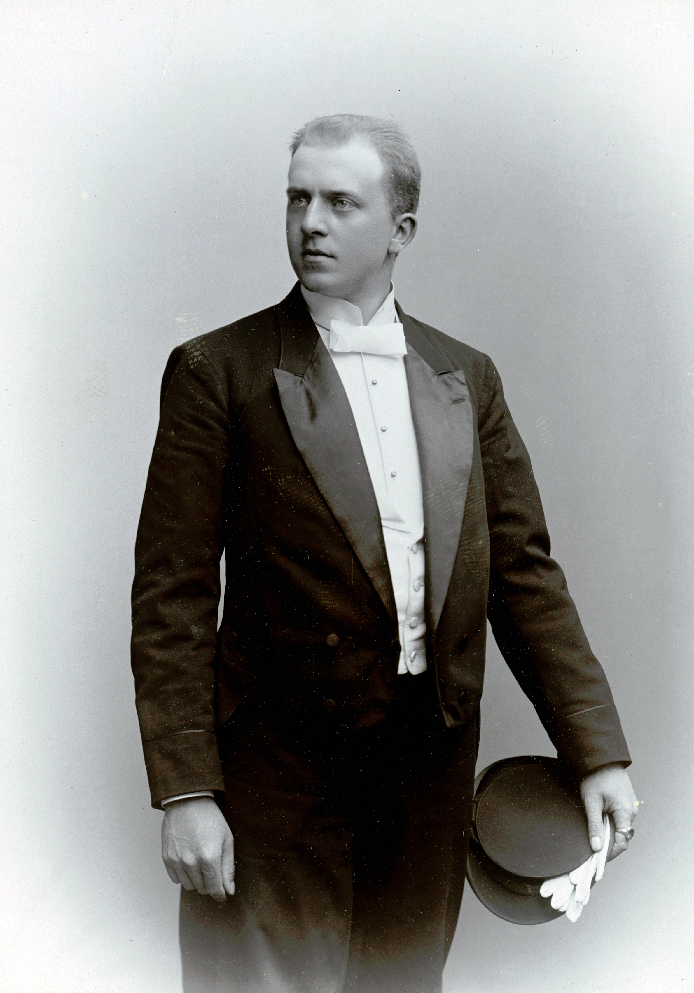 Gunnar Klintberg, elev vid Dramatiska teatern 1894-95